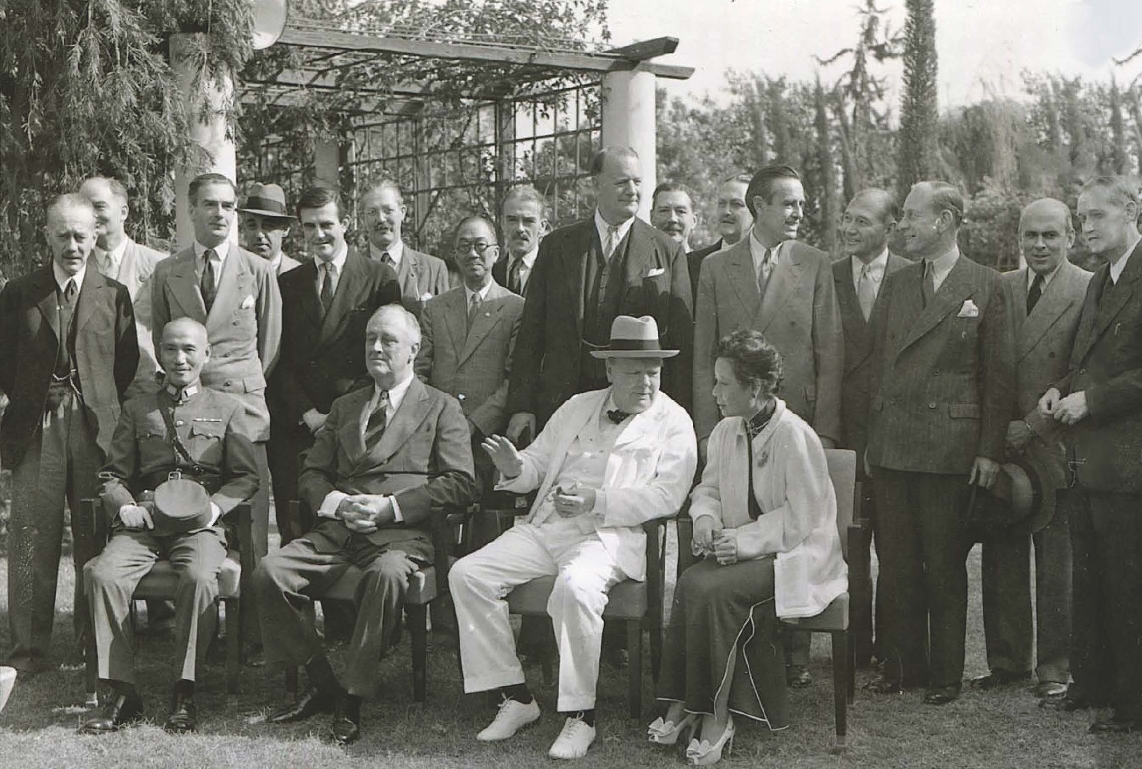 開羅會議，中美英領導人與外交官的合照